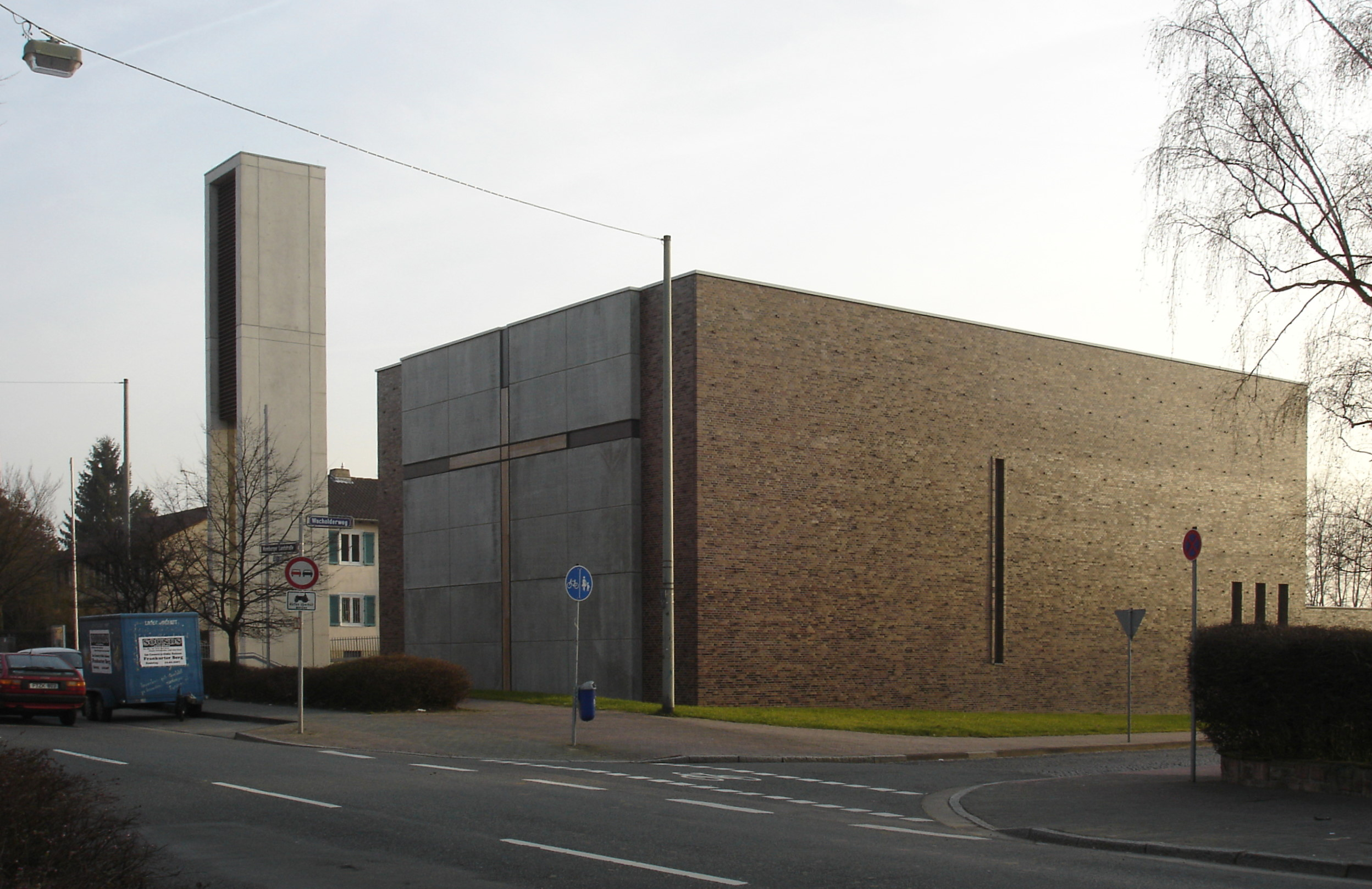 "Allerheiligste Dreifaltigkeit" an der Homburger Landstraße (Frankfurter-Berg)